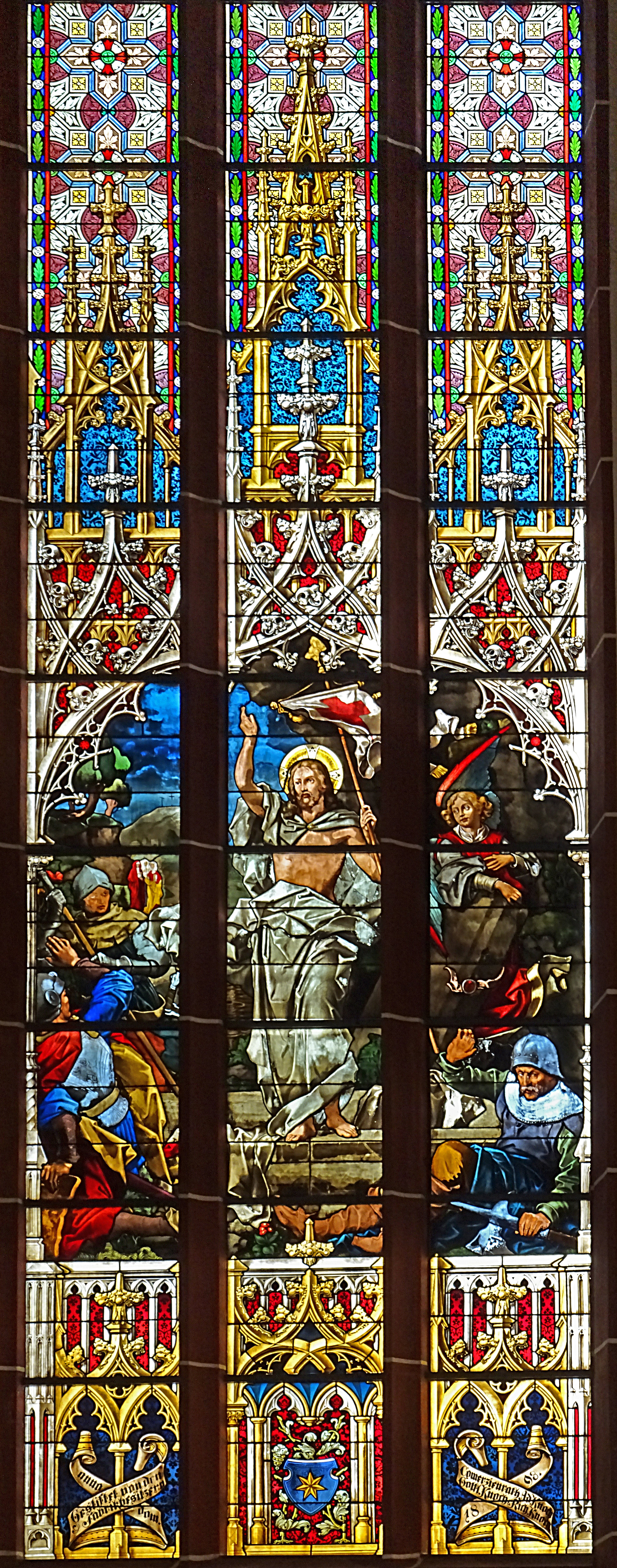 rechtes Chorfenster - Ostern - in der Johanneskirche Saalfeld